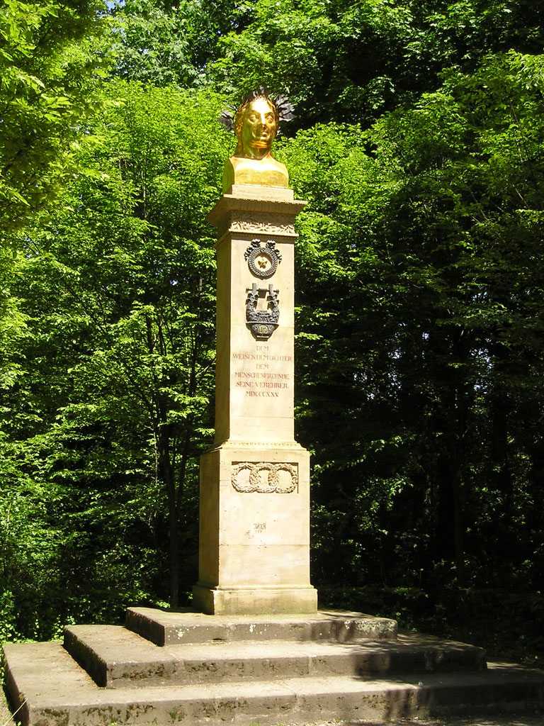 Uz-Denkmal im Ansbacher Hofgarten